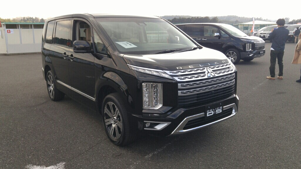 2019年撮影。